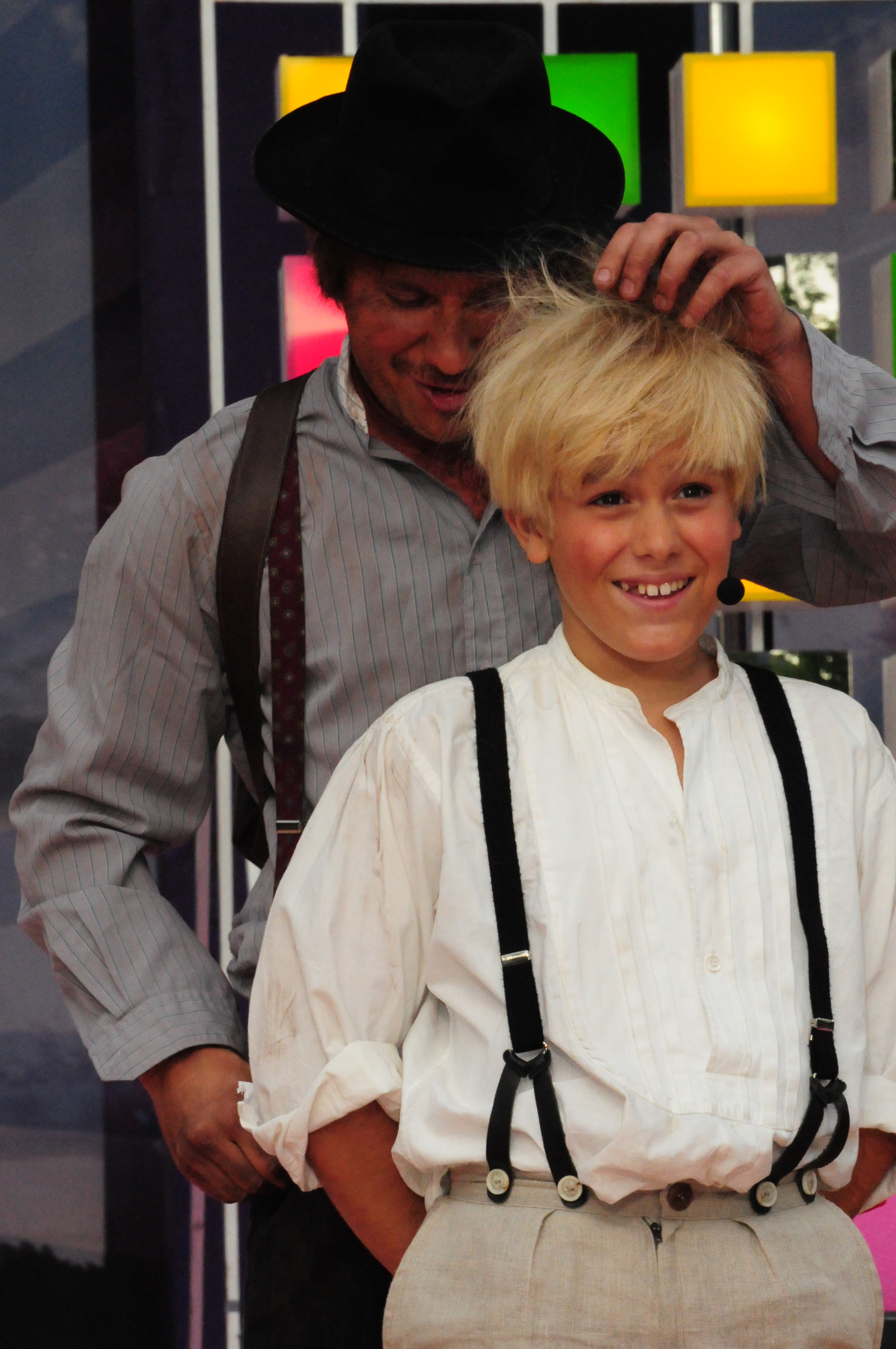 Markoolio & Benjamin Wahlgren 2009